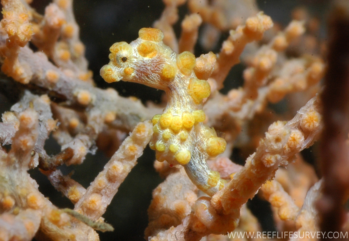 Hippocampus bargibanti, Sulawesi, Indonesia